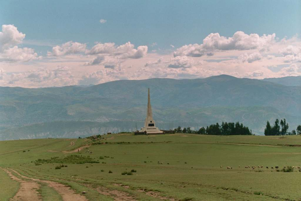 Pampa de Quinua, Batalla de Ayacucho